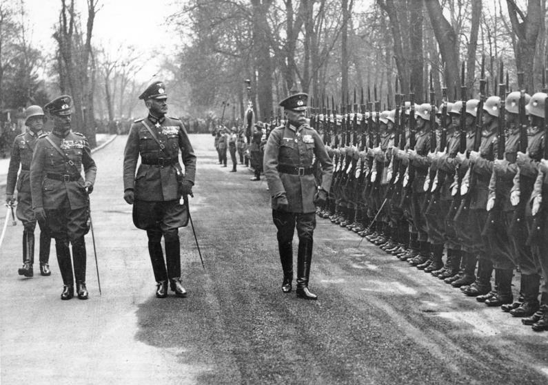 Am 22. April [1936] konnte der Schöpfer der deutschen Reichswehr, Generaloberst von Seeckt, bei bester Gesundheit seinen 70. Geburtstag in der Reichshauptstadt begehen. Der Führer hat aus diesem Anlass Seeckt zum Chef des Infanterie-Regiments 67 ernannt. Reichskriegsminister Generalfeldmarschall von Blomberg überbrachte dem Generaloberst, vor dessen Haus Doppelposten als Ehrenwache aufgezogen waren, die Glückwünsche der Wehrmacht. Eine Ehrenkompanie des Infanterie-Regiments 67 erwies militärische Ehren. Generaloberst von Seeckt schreitet zusammen mit dem Reichskriegsminister Generalfeldmarschall von Blomberg die Front der Ehrenkompanie der 67er ab. Scherl Bilderdienst Berlin ADN-ZB/Archiv Faschistisches Deutschland 1933 - 1945 Ehrung zum 70. Geburtstag von Generaloberst von Seeckt am 232.4.1936 in Berlin. - Generaloberst von Seeckt schreitet zusammen mit dem Reichskriegsminister Generalfeldmarschall von Blomberg die Front der Ehrenkompanie der 67er ab.